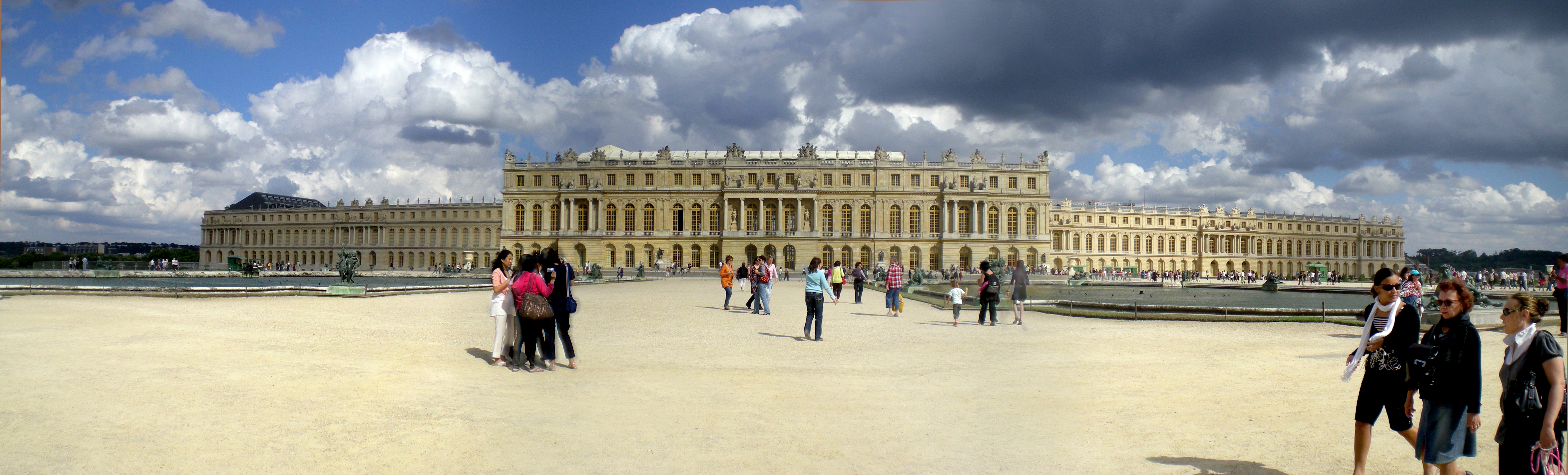 Versaille'n palatsi (panorama)